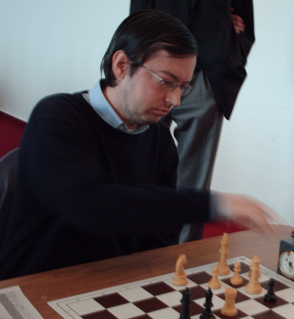 Karsten Müller bei der 6. Deutschen Betriebsschach-Mannschaftsmeisterschaft am 5. Oktober 2006 in Berlin